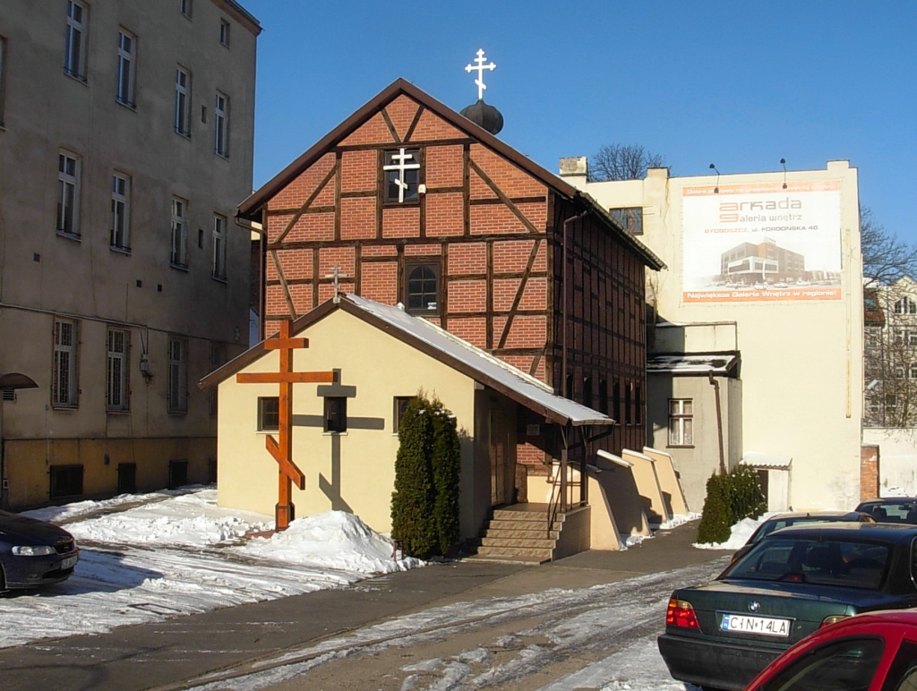 Cerkiew prawosławna w Bydgoszczy